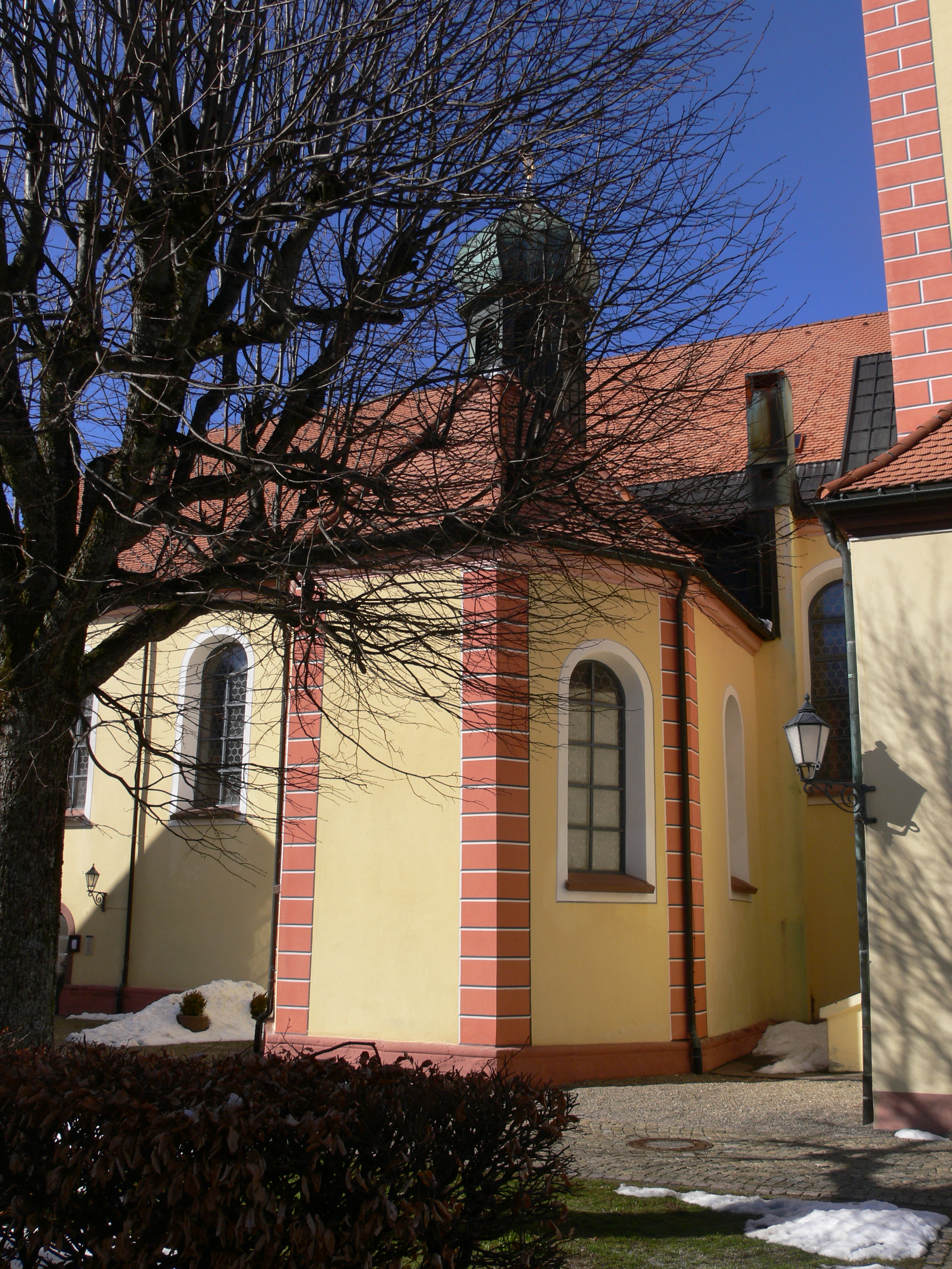 Ehemalige Klosterkirche (heute Katholische Pfarr- und Wallfahrtskirche) Mariä Himmelfahrt, St. Märgen im Schwarzwald: Äußeres der Josefskapelle (im Klosterhof)